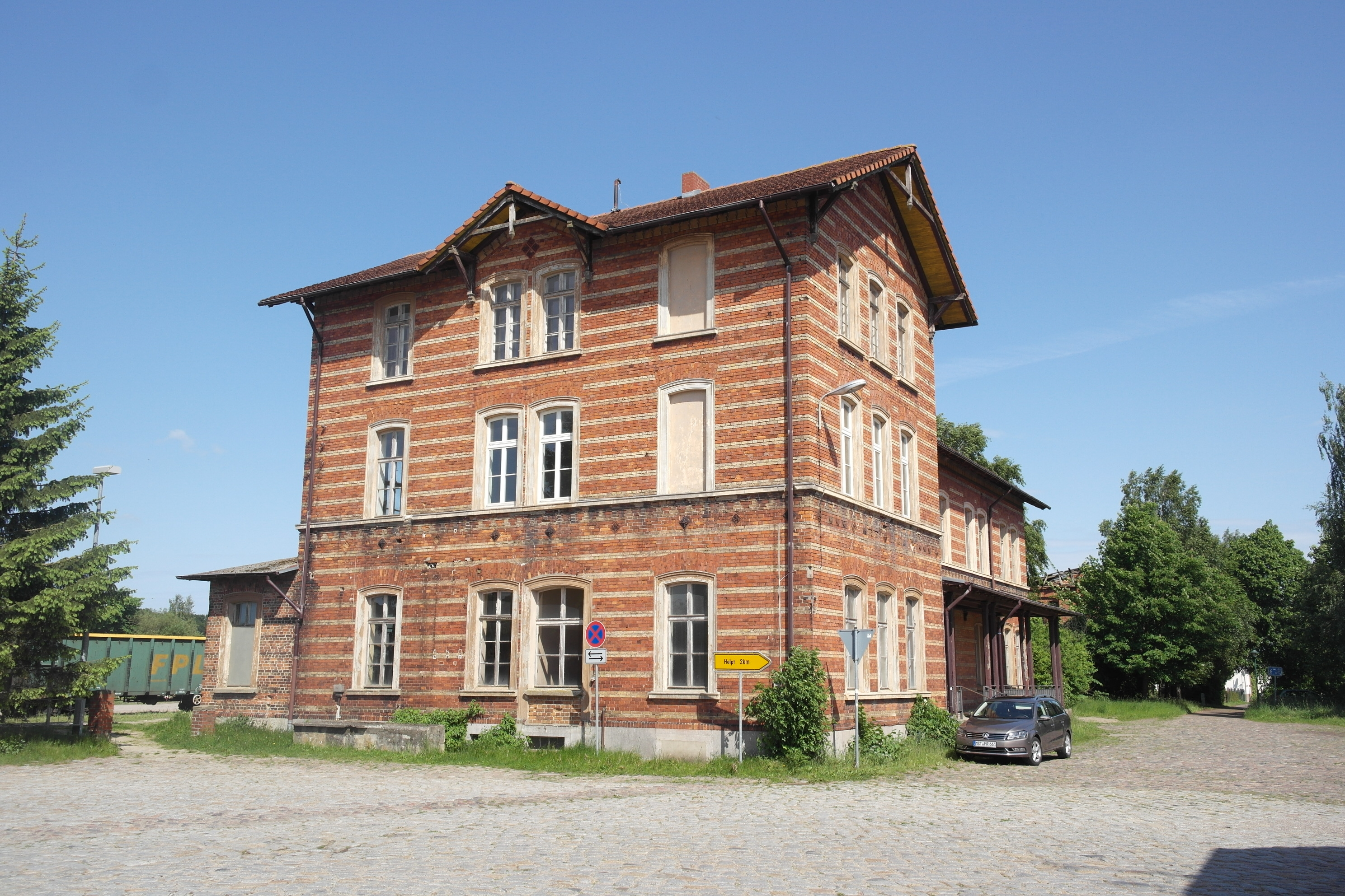 Oertzenhof, denkmalgeschützter Bahnhof